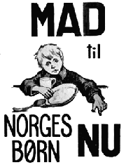 Plakat Norgeshjælpen